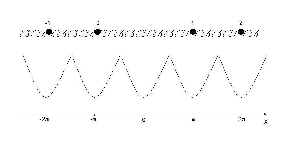 A lattice of masses under external potential